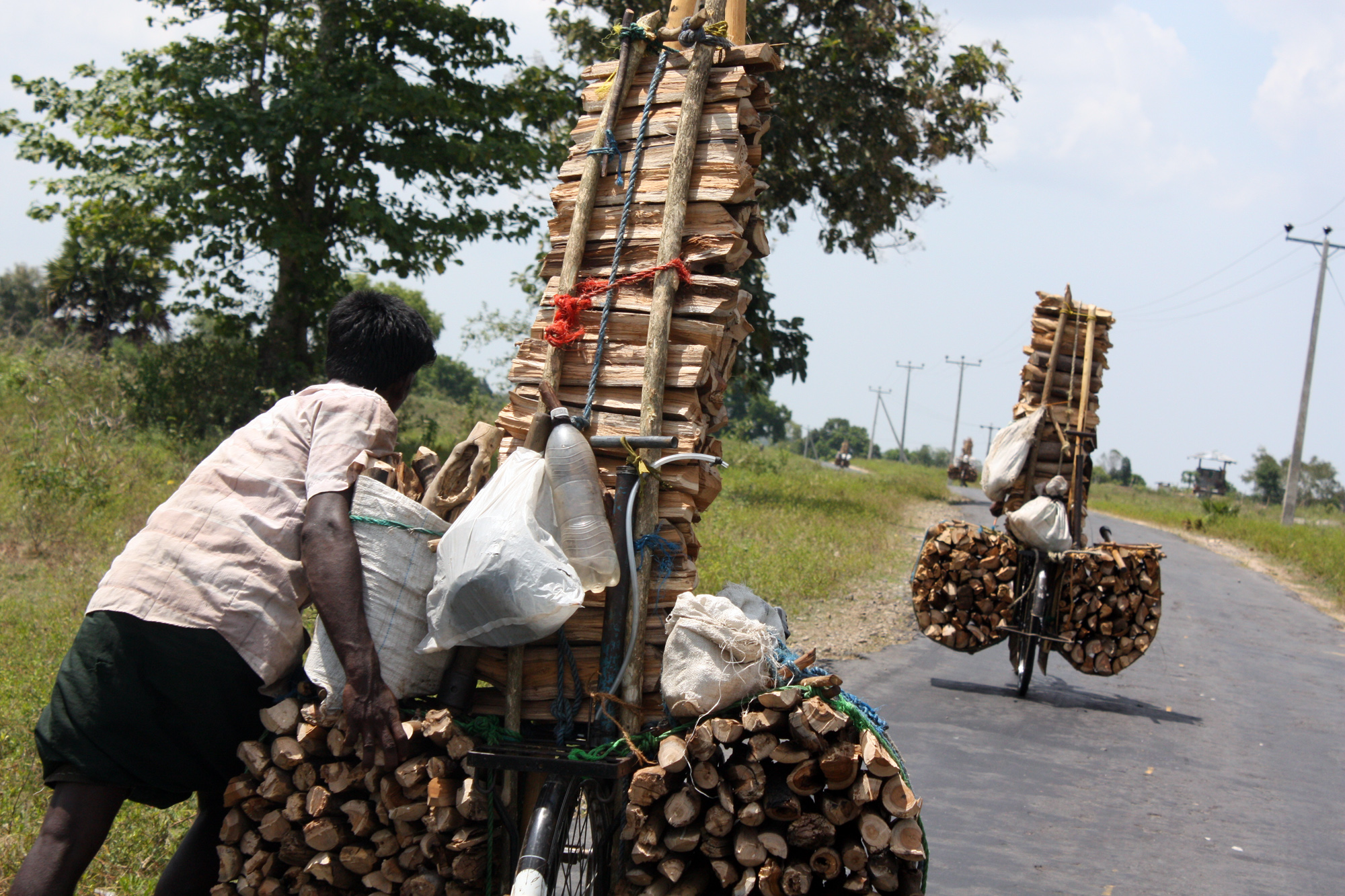 விறகு விற்பனை, கிராமத்திலுள்ள ஜீவனோபாயம் - மட்டக்களப்பு